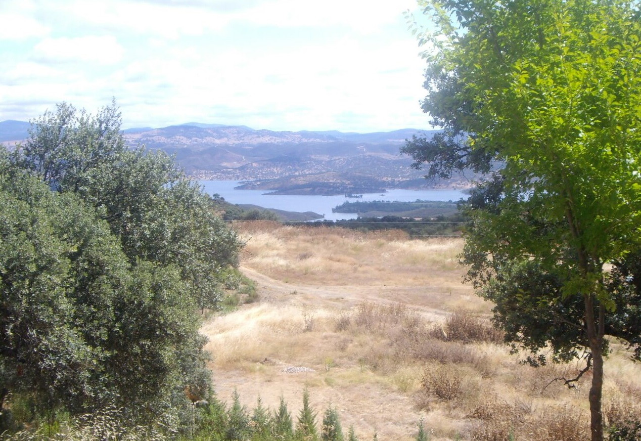 Embalse de Aracena (Sierra Morena), Huelva (España)